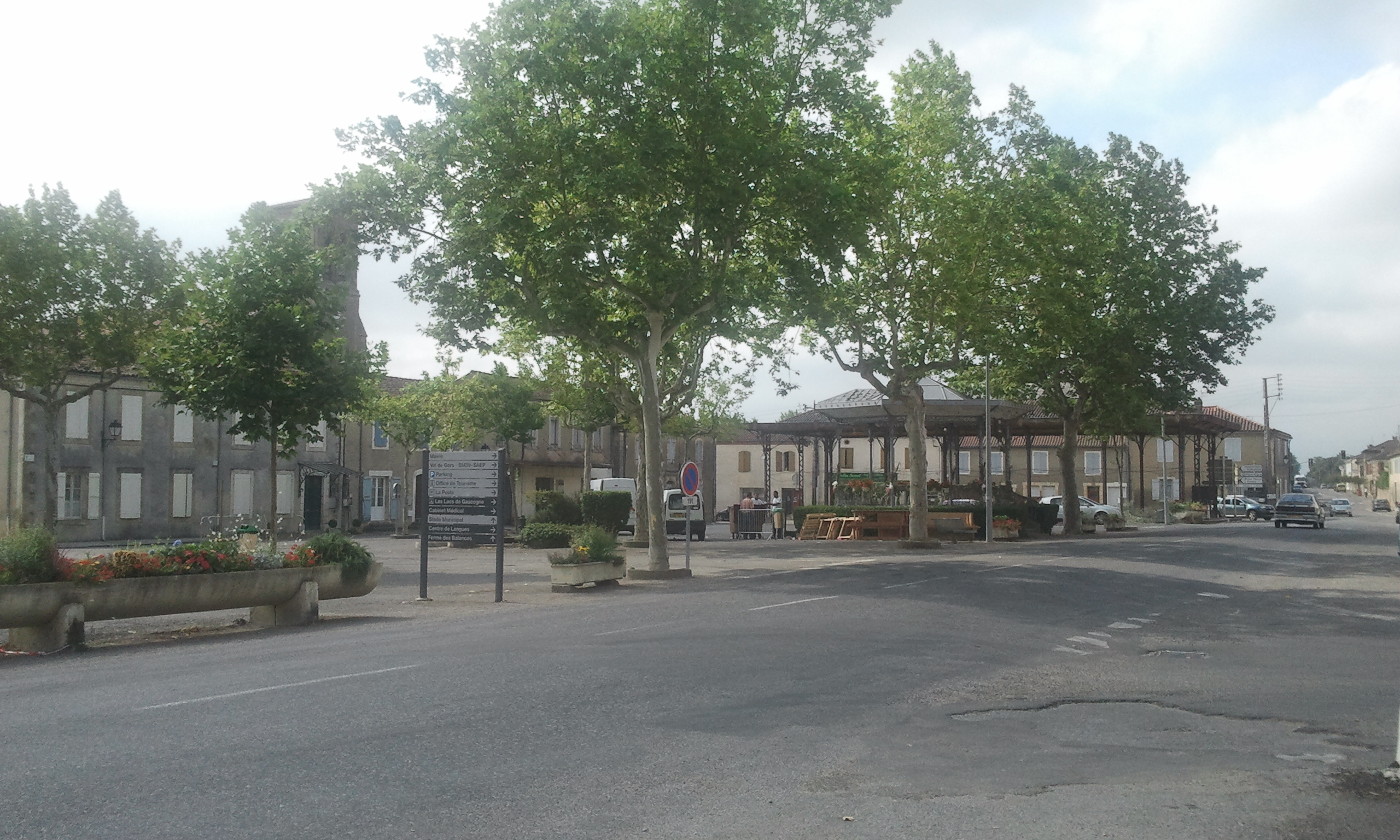 Place centrale de Seissan